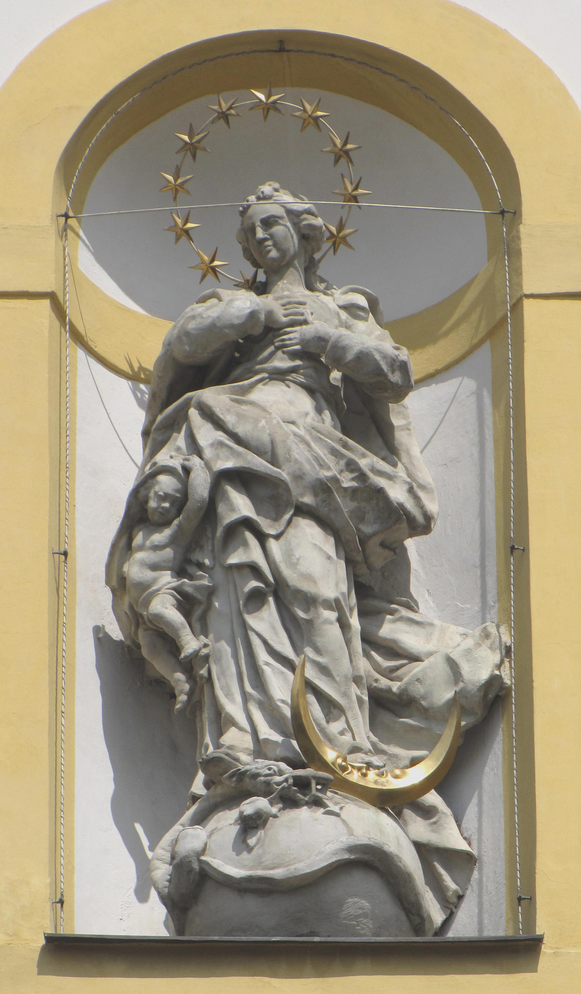 Maria Immakulata an der Fassade der Basilika in Wilten/Innsbruck von Joseph Stapf, Pfronten, 1751